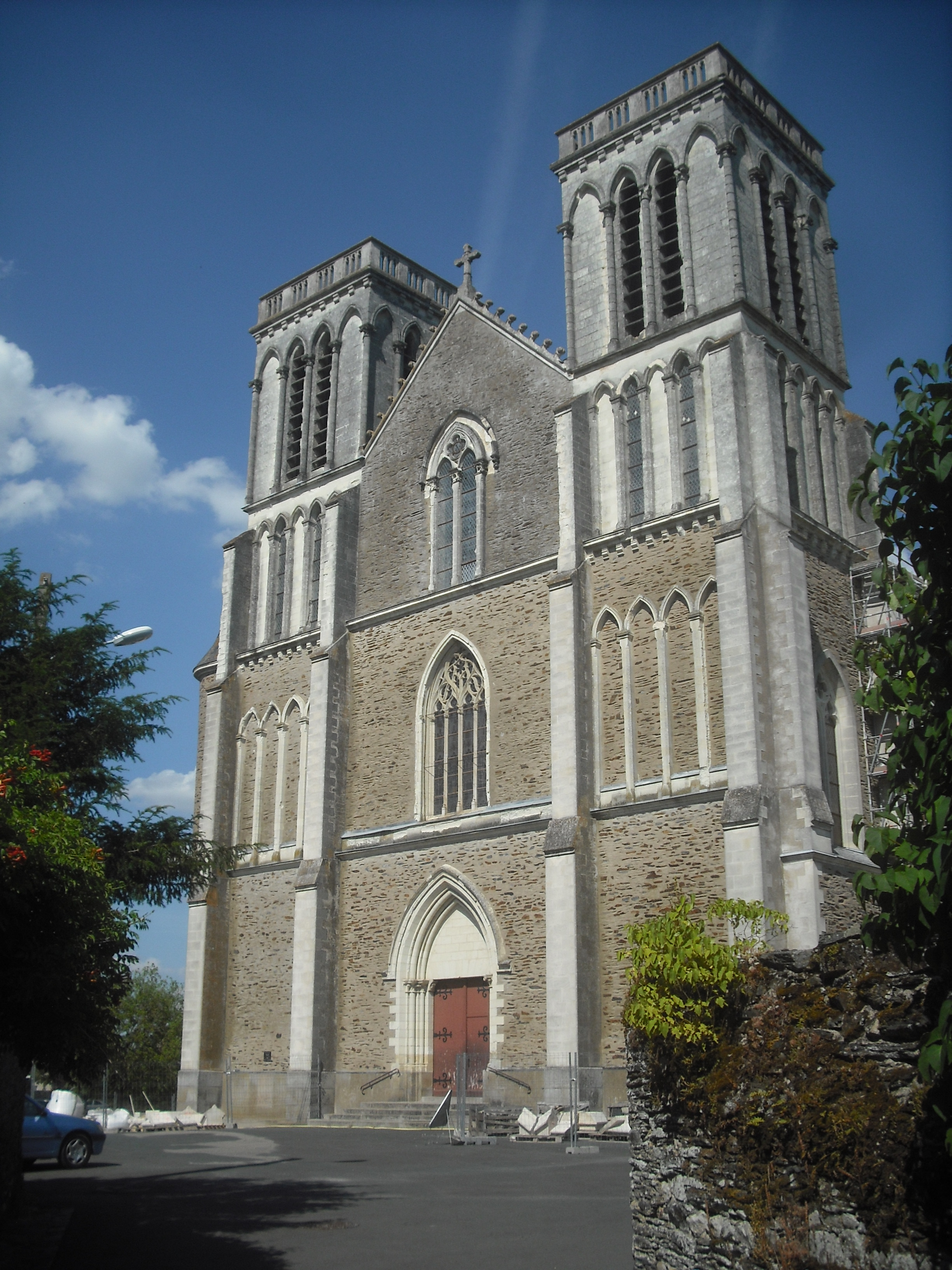 Eglise de Candé, Maine-et-Loire, France.